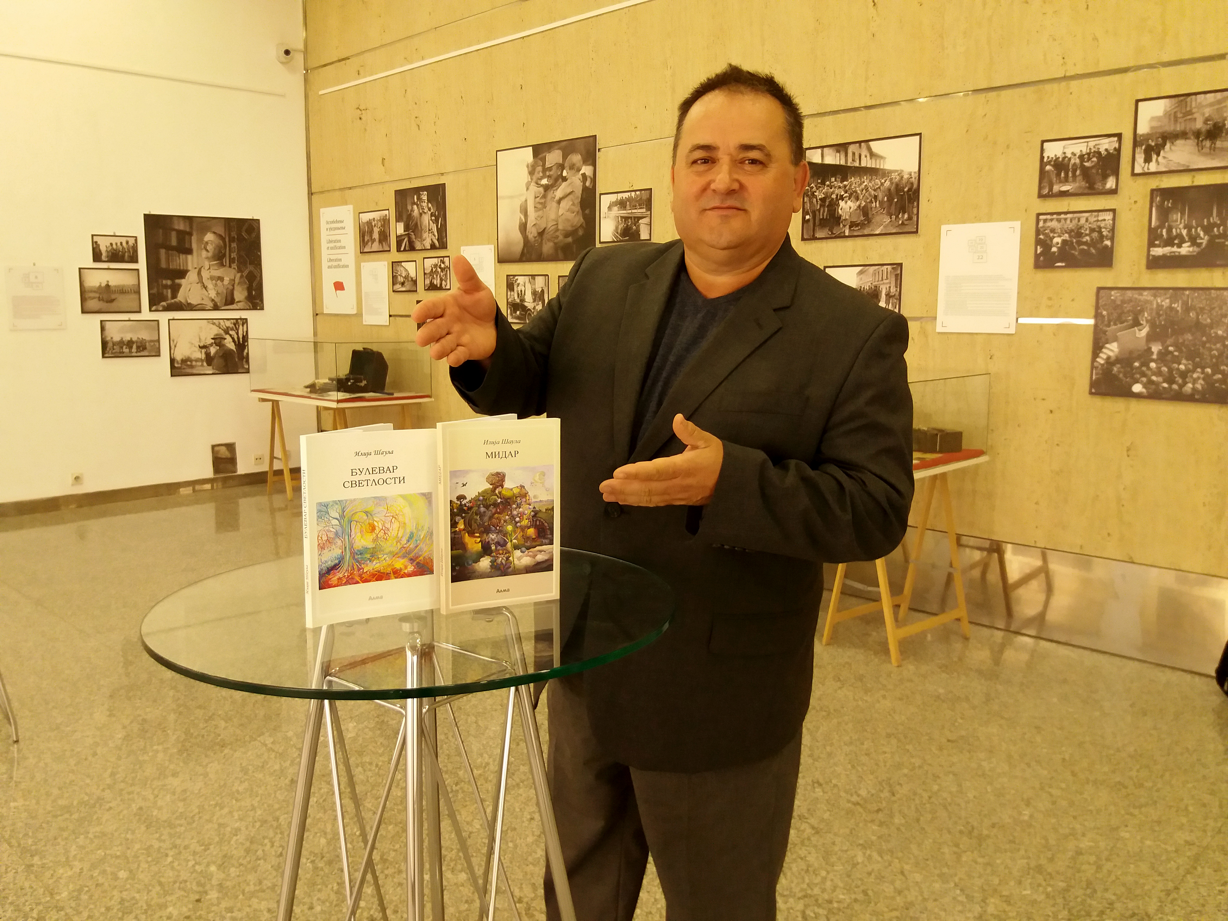 Srpski (latinica): Ilija Šaula sa svojim delima